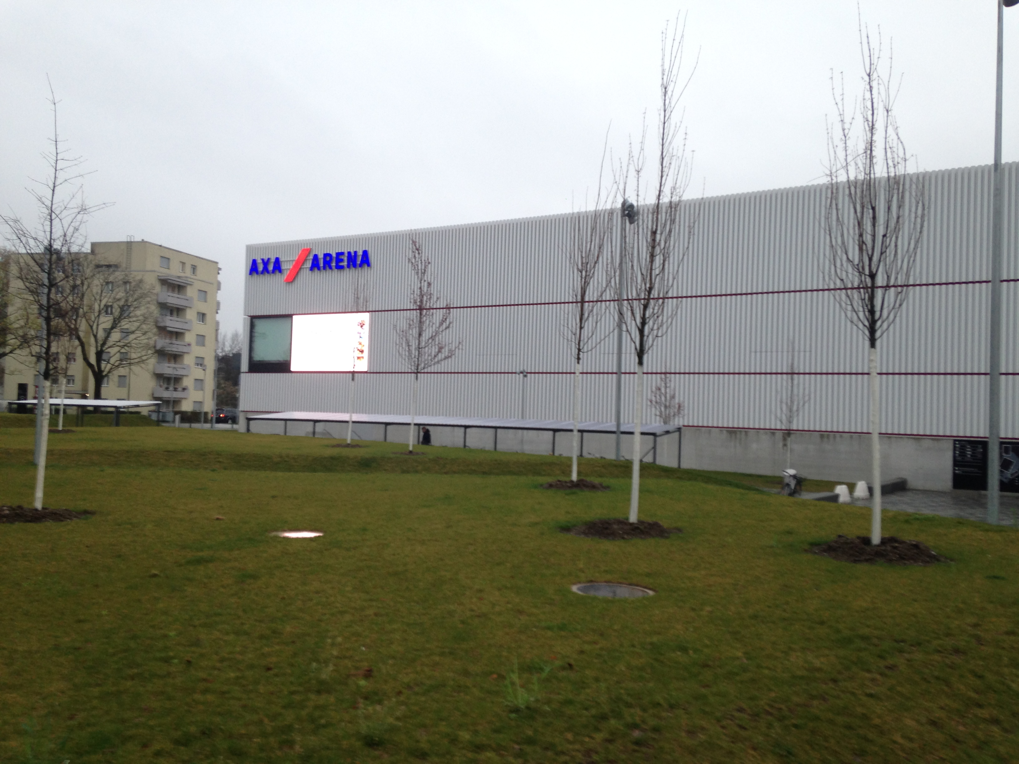 Axa Arena Winterthur